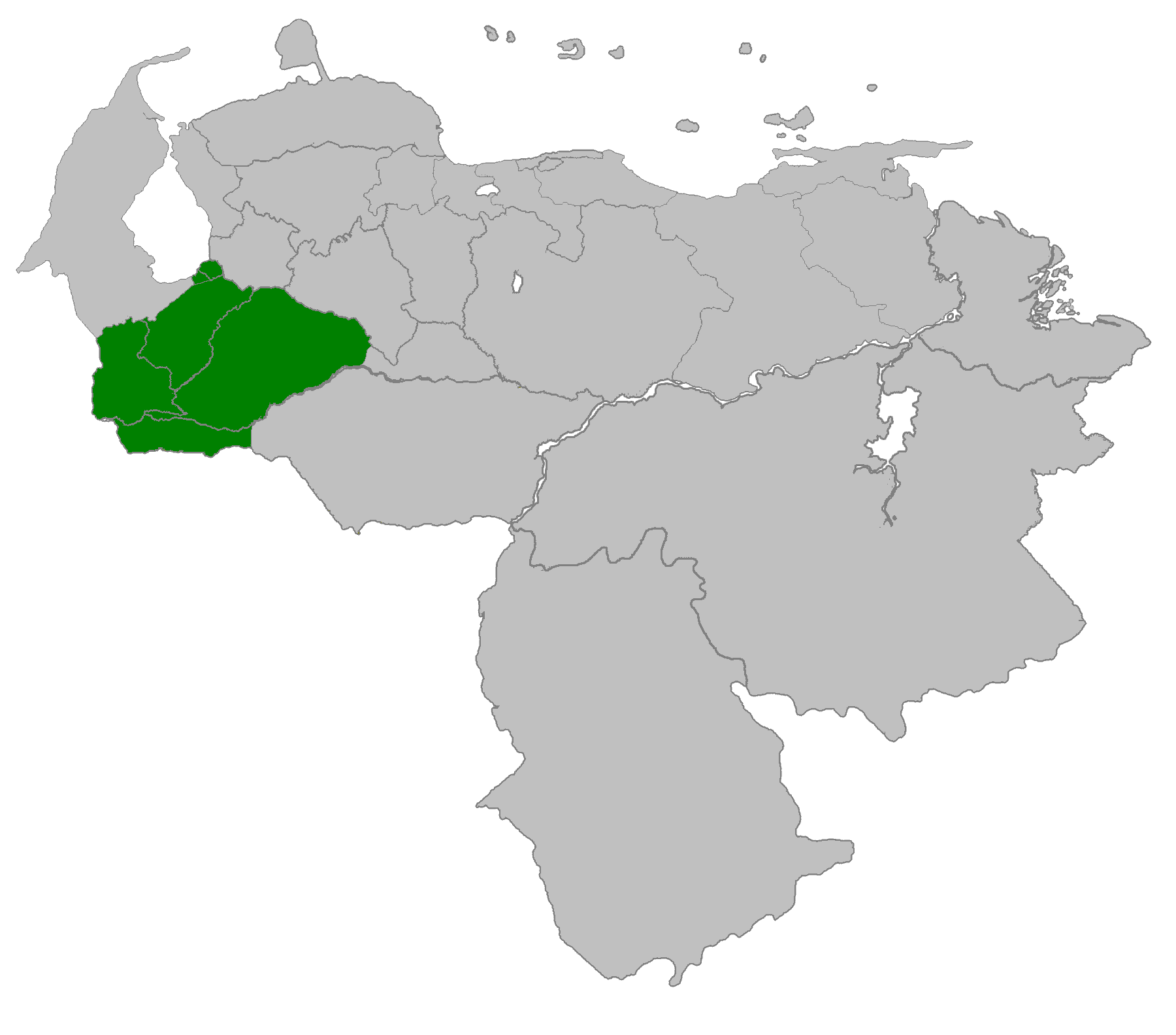 Provincia de Mérida, Colonial siglo XVII.